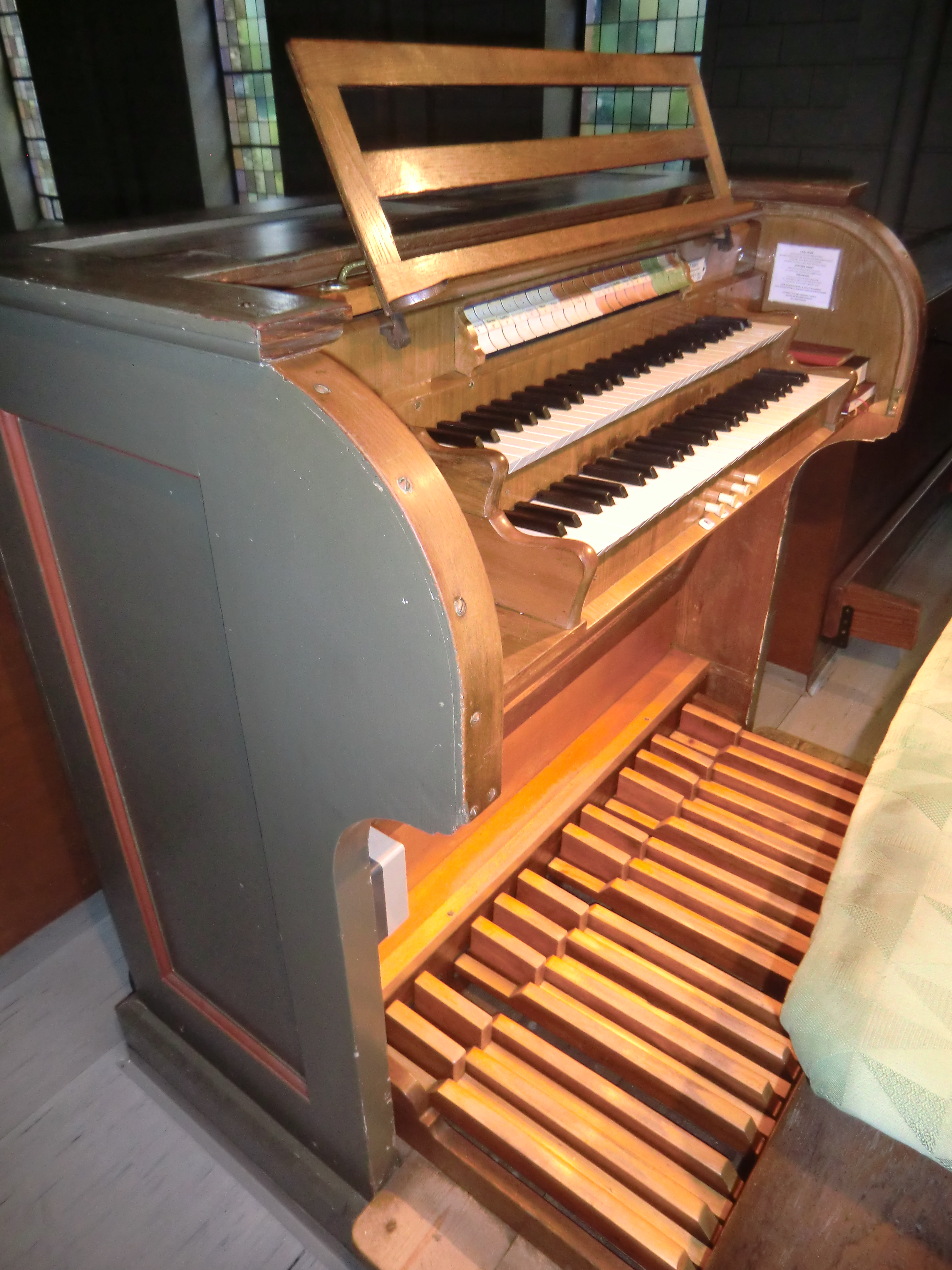 Orgelbauer Carl Horn: Spieltisch einer Orgel (II/15/P)